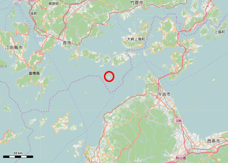 広島県呉市の斎島周辺 This map may be incomplete, and may contain errors. Don't rely solely on it for navigation.